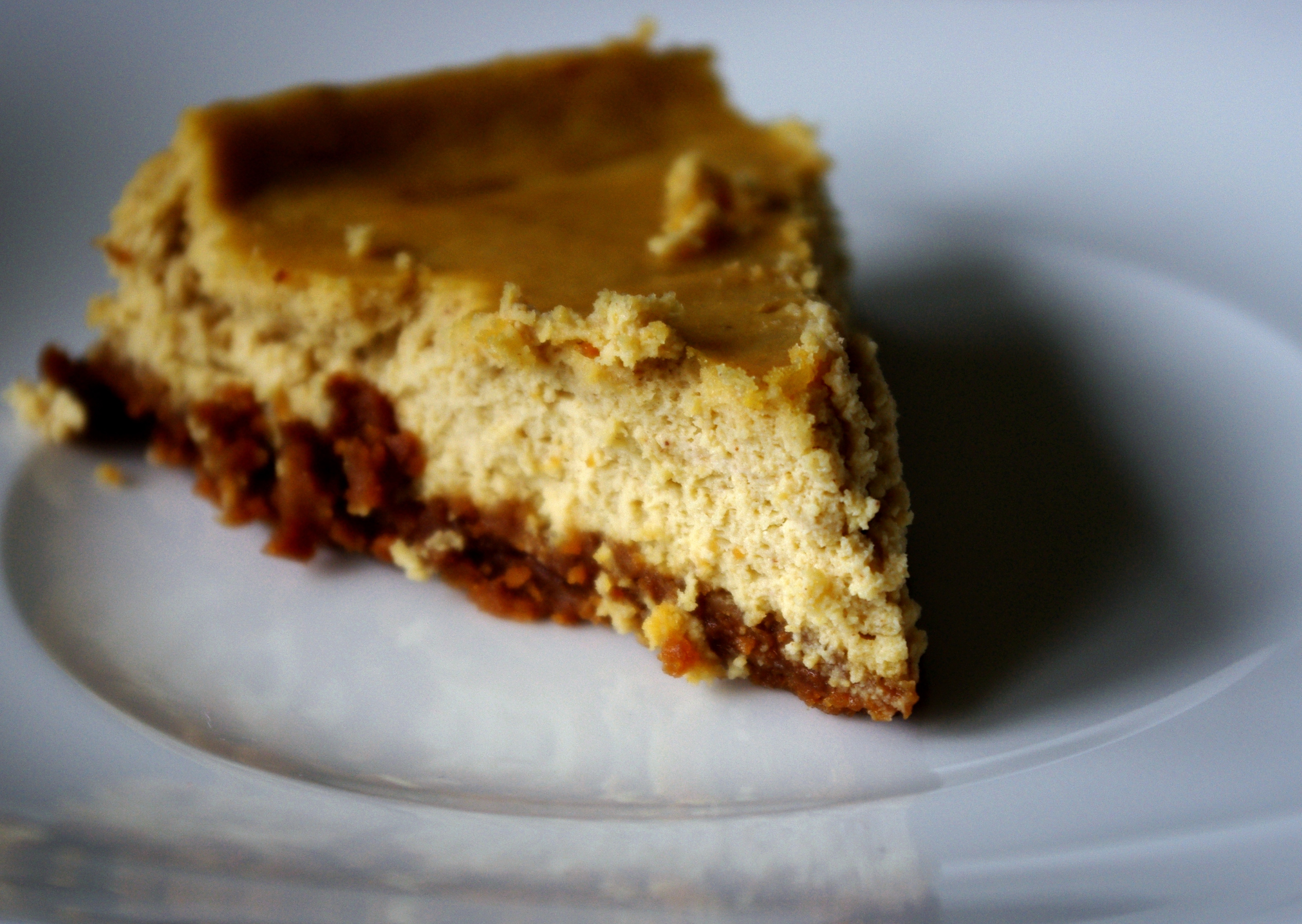 Caféspéculoos cheesecake